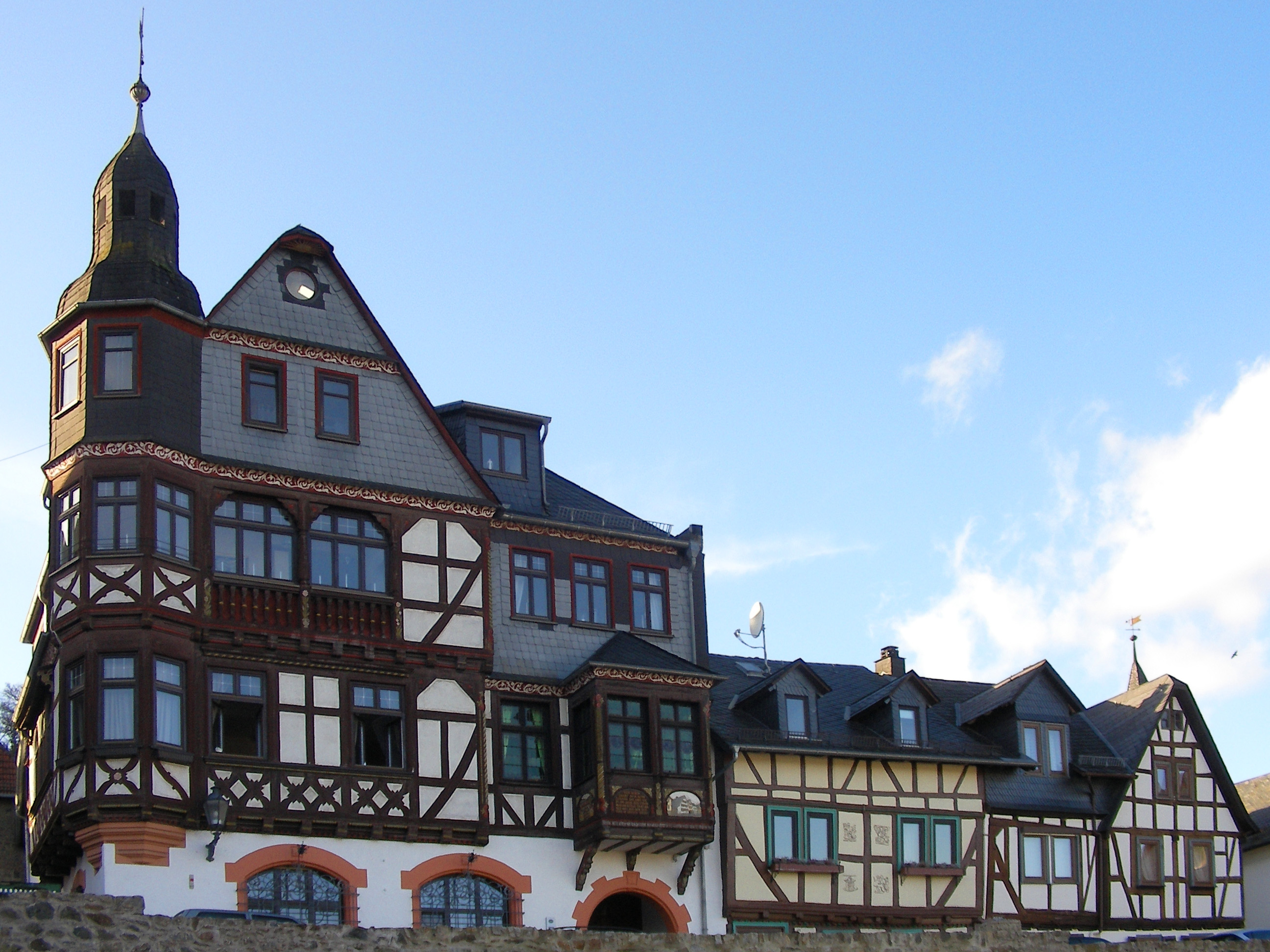 Timber Frame (Fachwerk) Houses „Auf der Schütt“, Braunfels, Germany